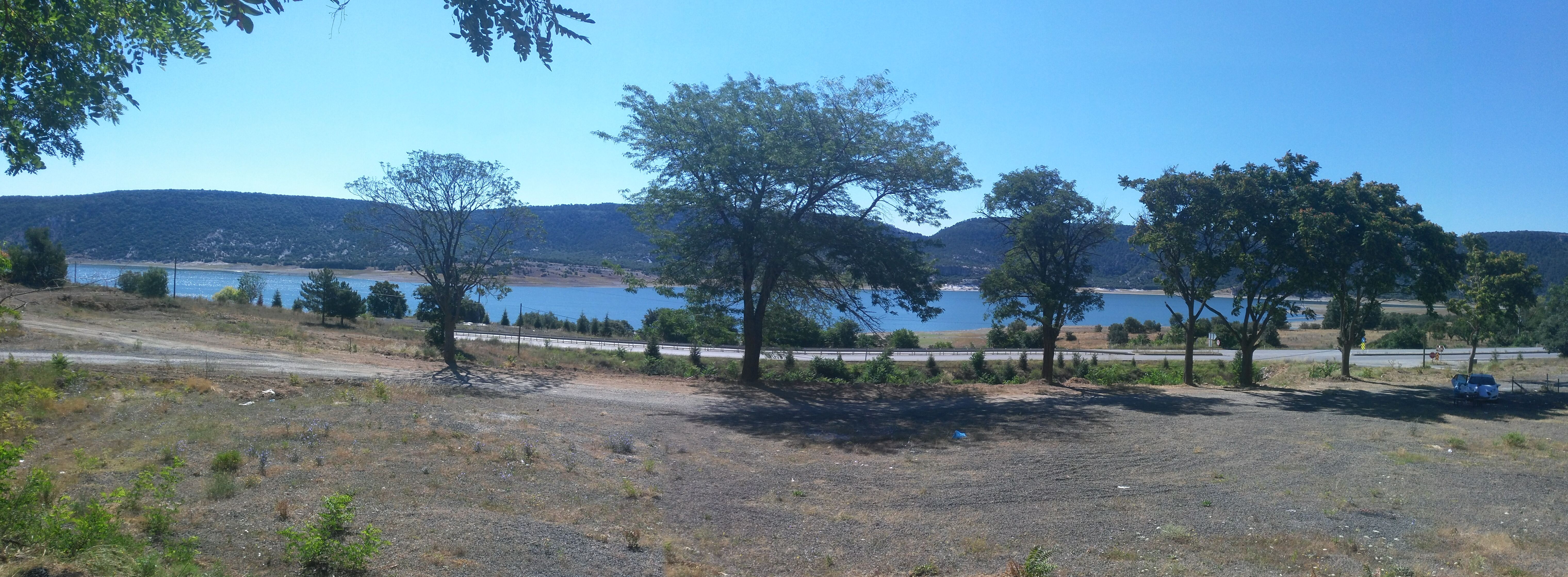 Porsuk Çayı üzerinde Porsuk Barajı